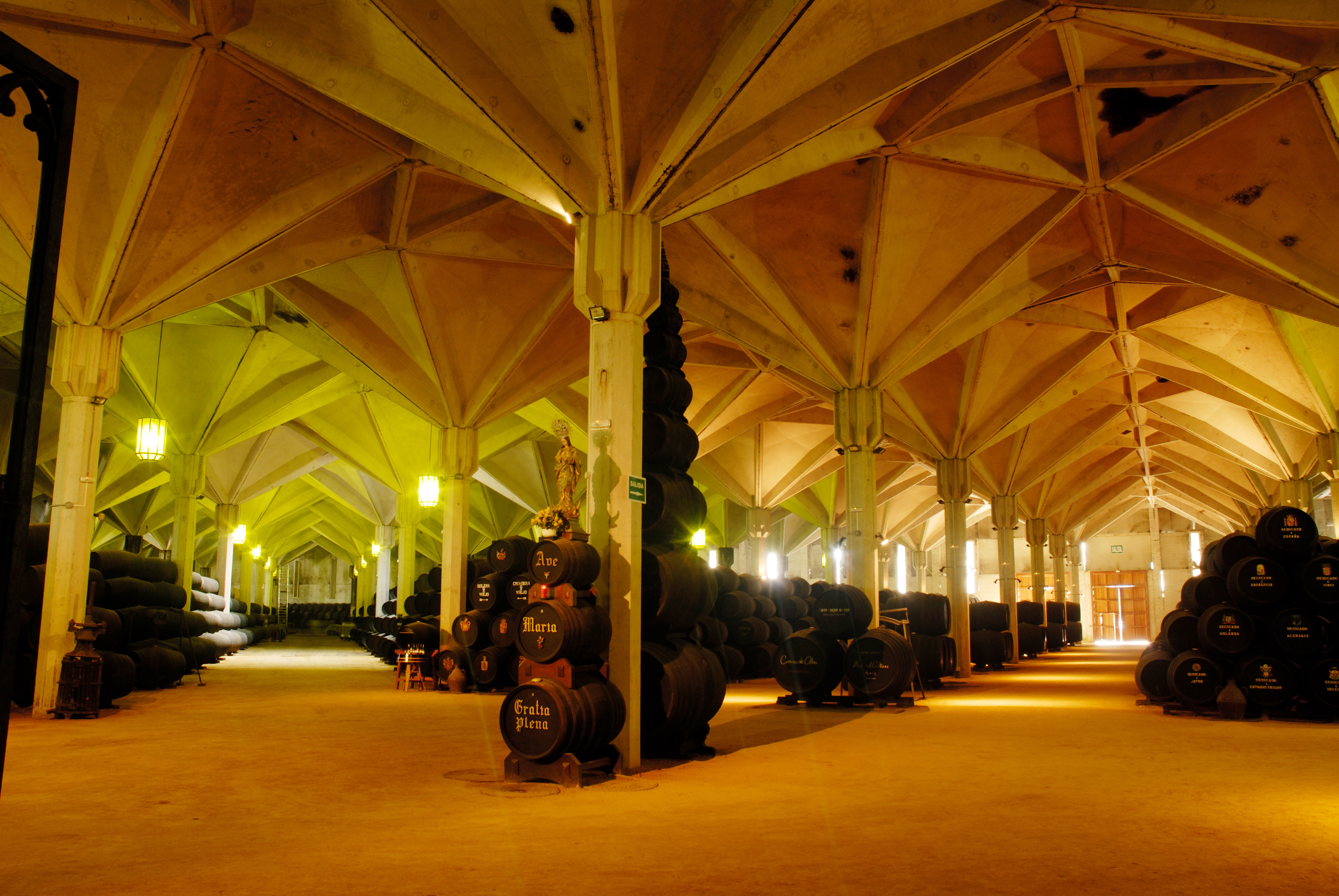 Interior de las Bodegas Internacionales, Jérez de la Frontera. Construidas en 1974, el edifciio proyectado por el arq, Ramón Montserrat está está recogido por Do.Co.Mo.Mo Ibérico. Actualmente estas bodegas son propiedad de Willliam Humbert